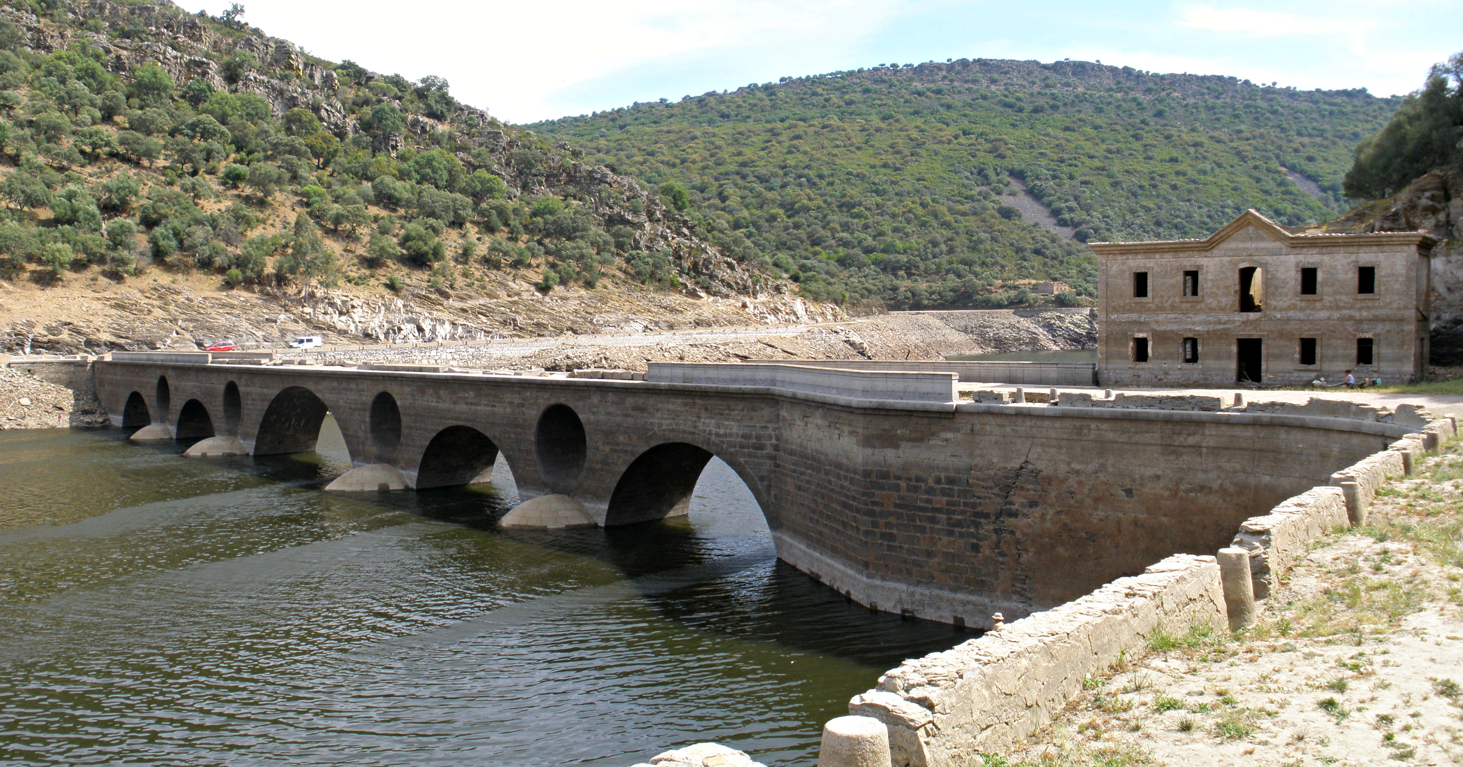 Puente del Cardenal, Monfragüe. Sólo es visible cuando el nivel del río Tajo es muy bajo.